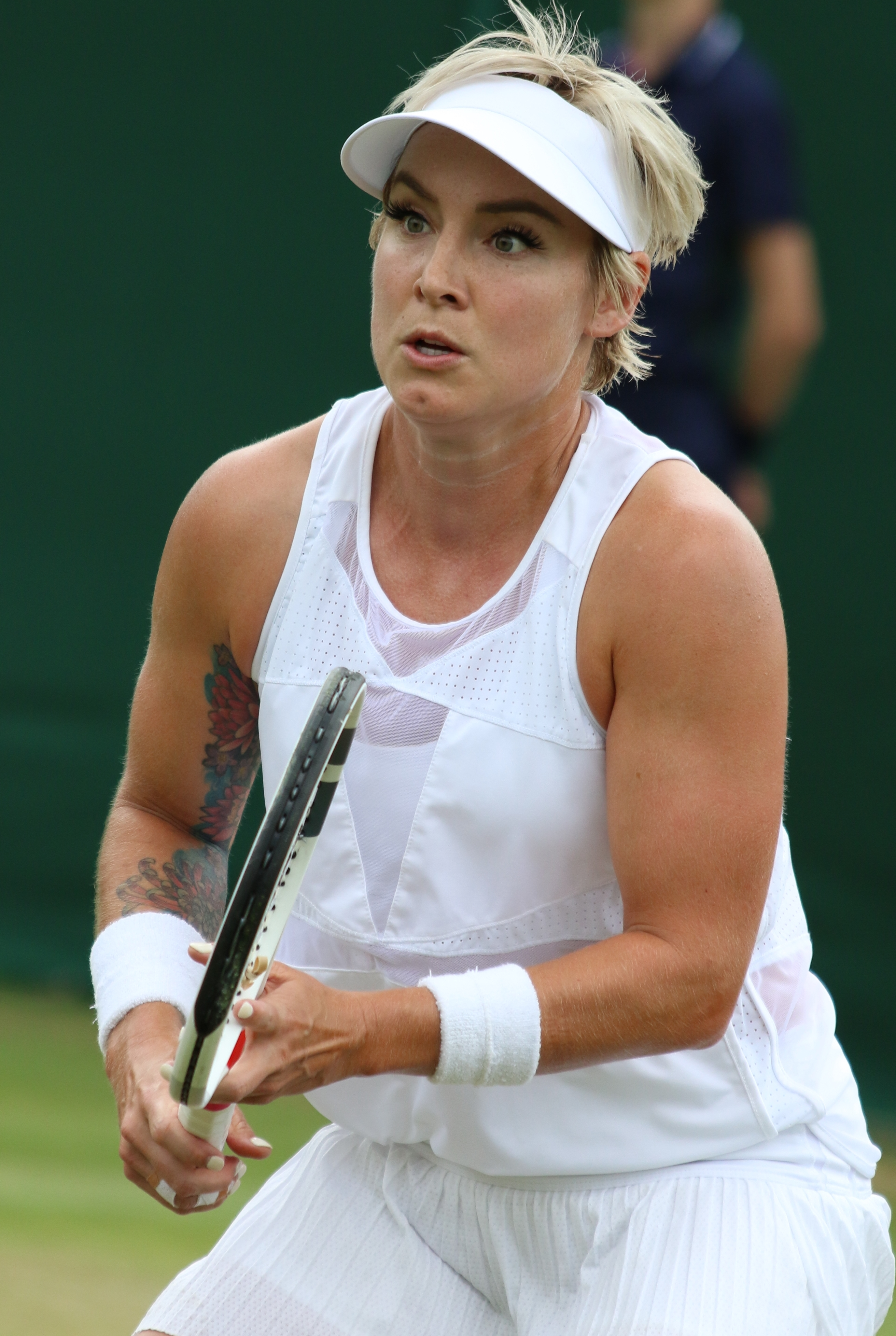 Mattek Sands WM19 (6)